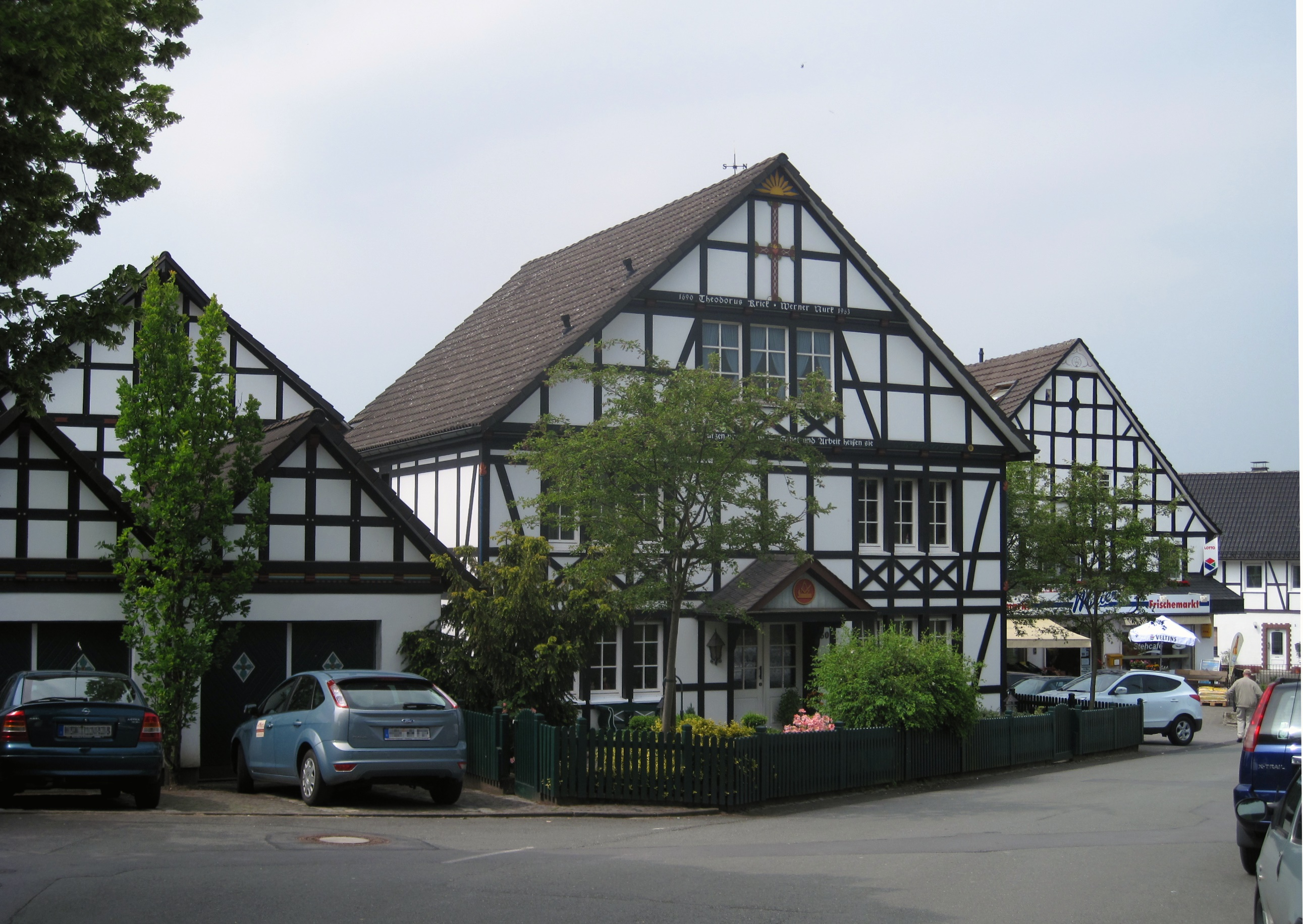 Fachwerkhaus Dorfstraße 30 in Meschede-Wennemen.